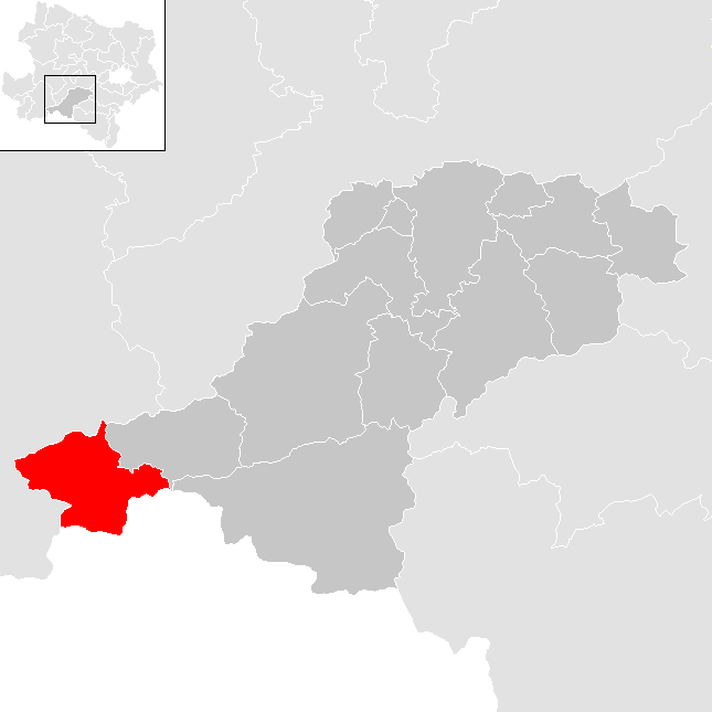 Bezirk Lilienfeld